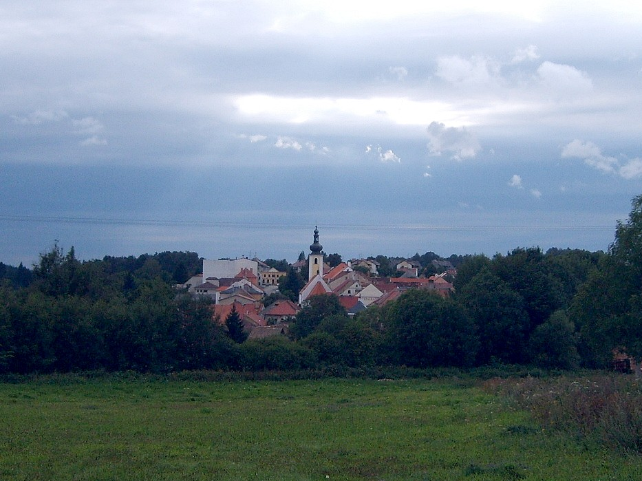 General view to Benešov nad Černou.